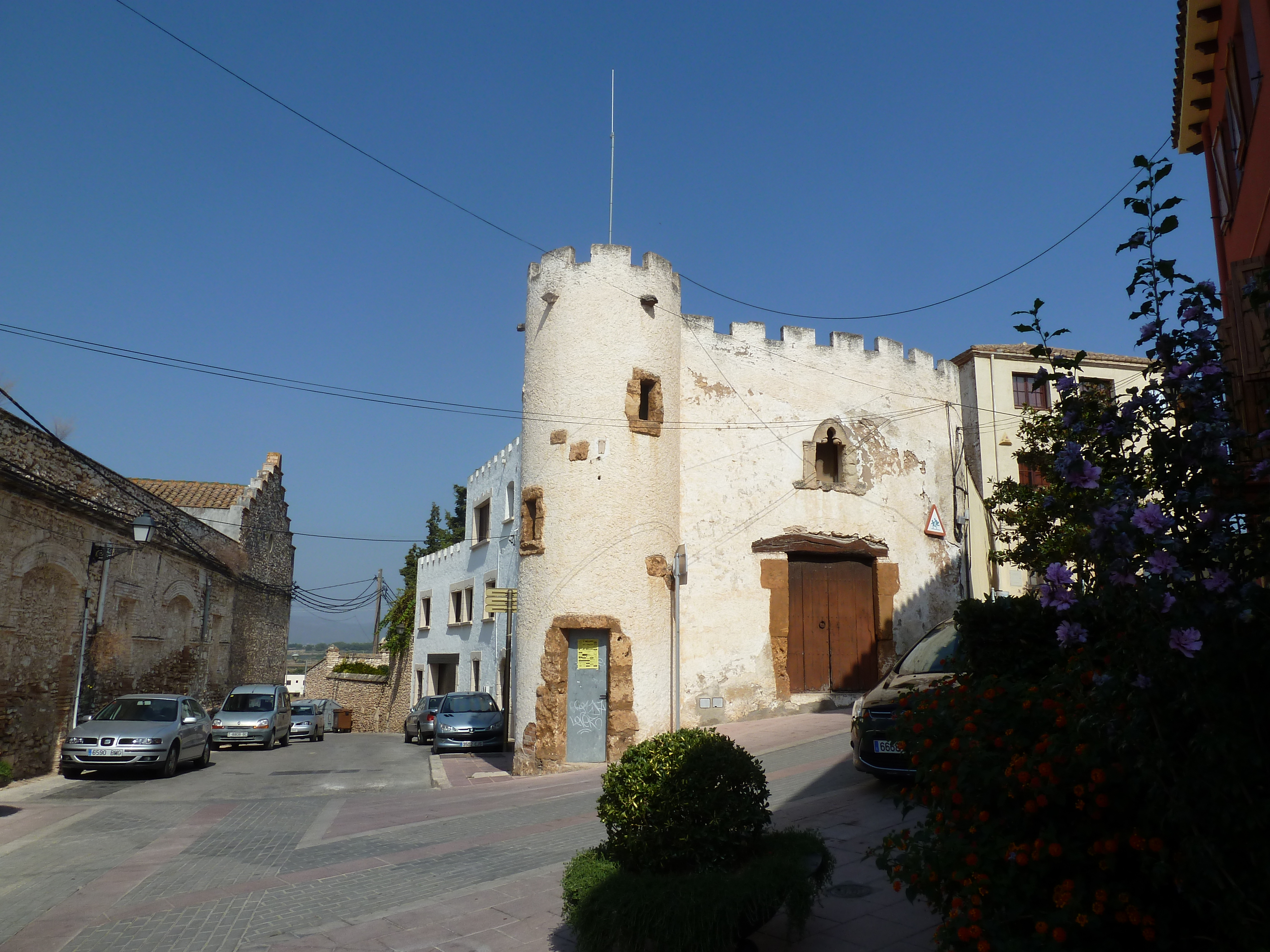 Casa al carrer del Cementiri, 2, de Bellvei